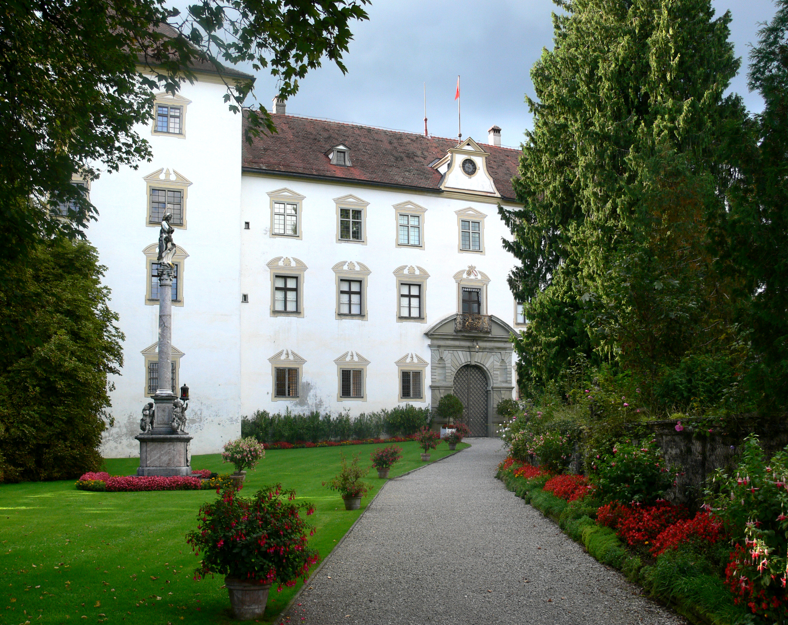 Schloss und Mariensäule, Wolfegg Mariensäule entworfen von Johann Georg Fischer, ausgeführt Antonio Barbacou, Innsbruck, 1720